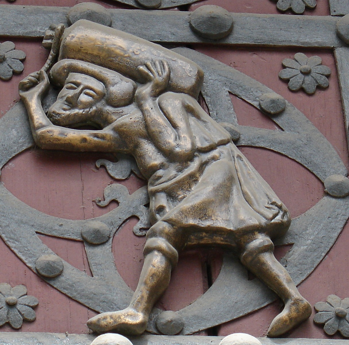 Bastaix a la porta principal de Santa Maria del Mar, Barcelona.